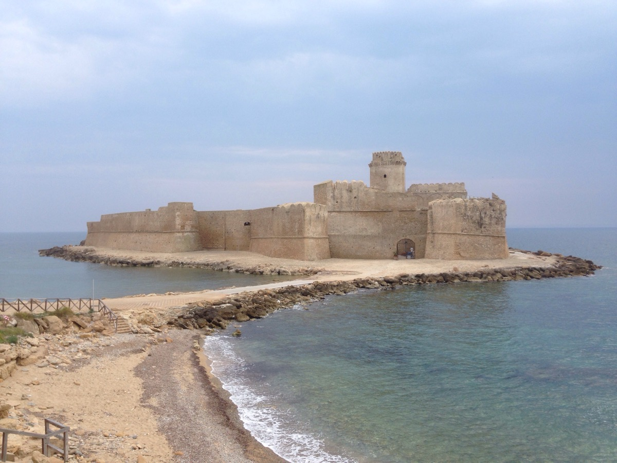 Замок Ле Кастелла, Италия